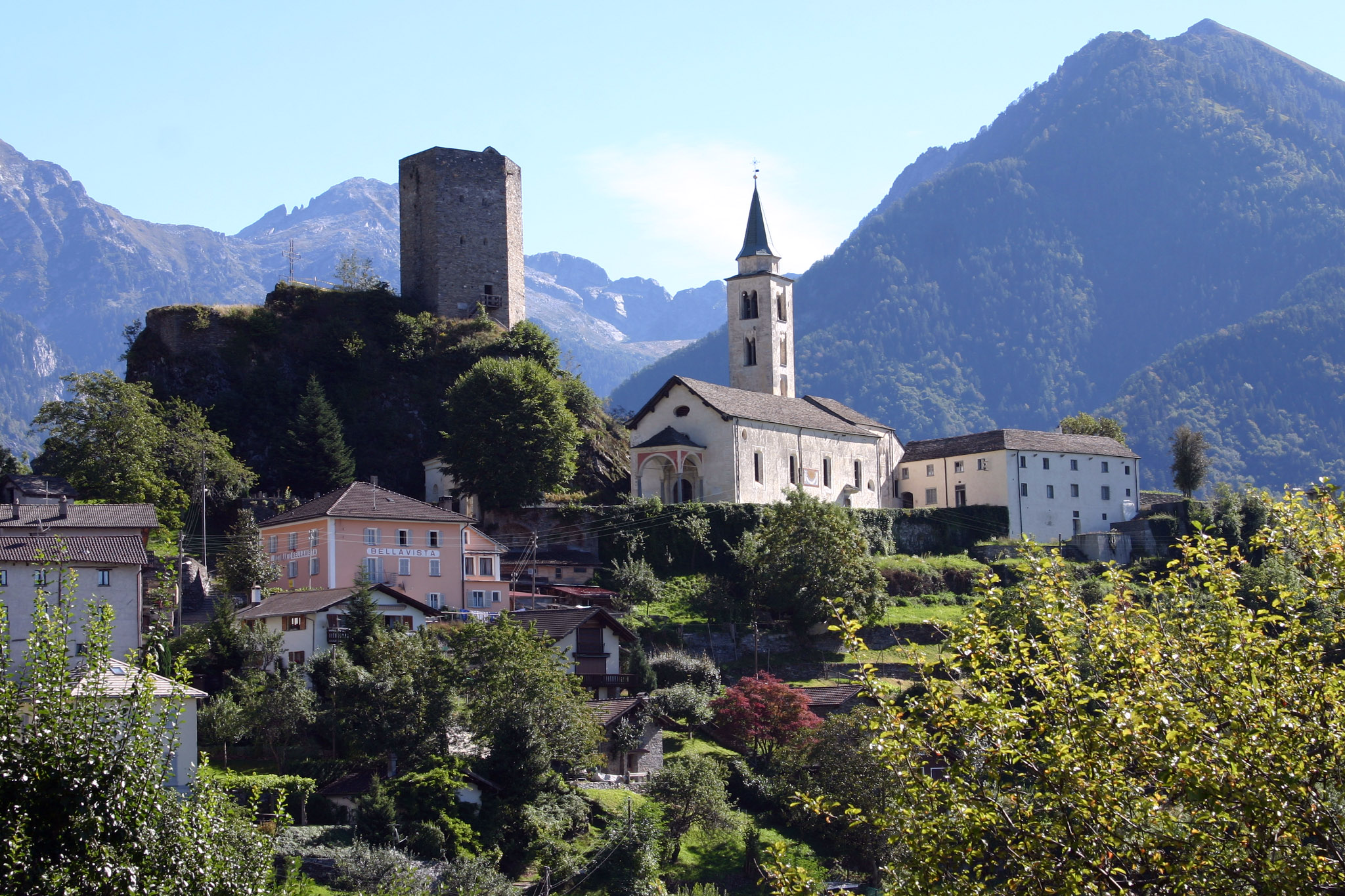 Santa Maria in Calanca, Switzerland